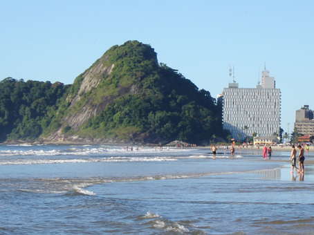 Foto do Balneário Caiobá (Matinhos, Paraná, Brazil) 2006